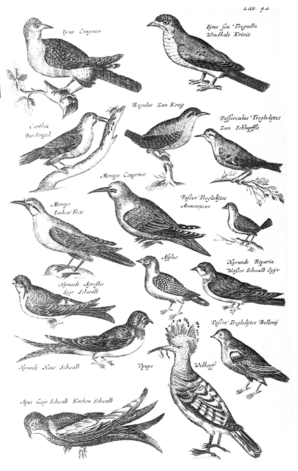 Sujet : Planche tirée de Natural history of birds (1650-1653) de John Jonston Source : Gravure du XVII siècle, tombée dans le domaine public. Artiste : Anna Maria Sibylla Merian.